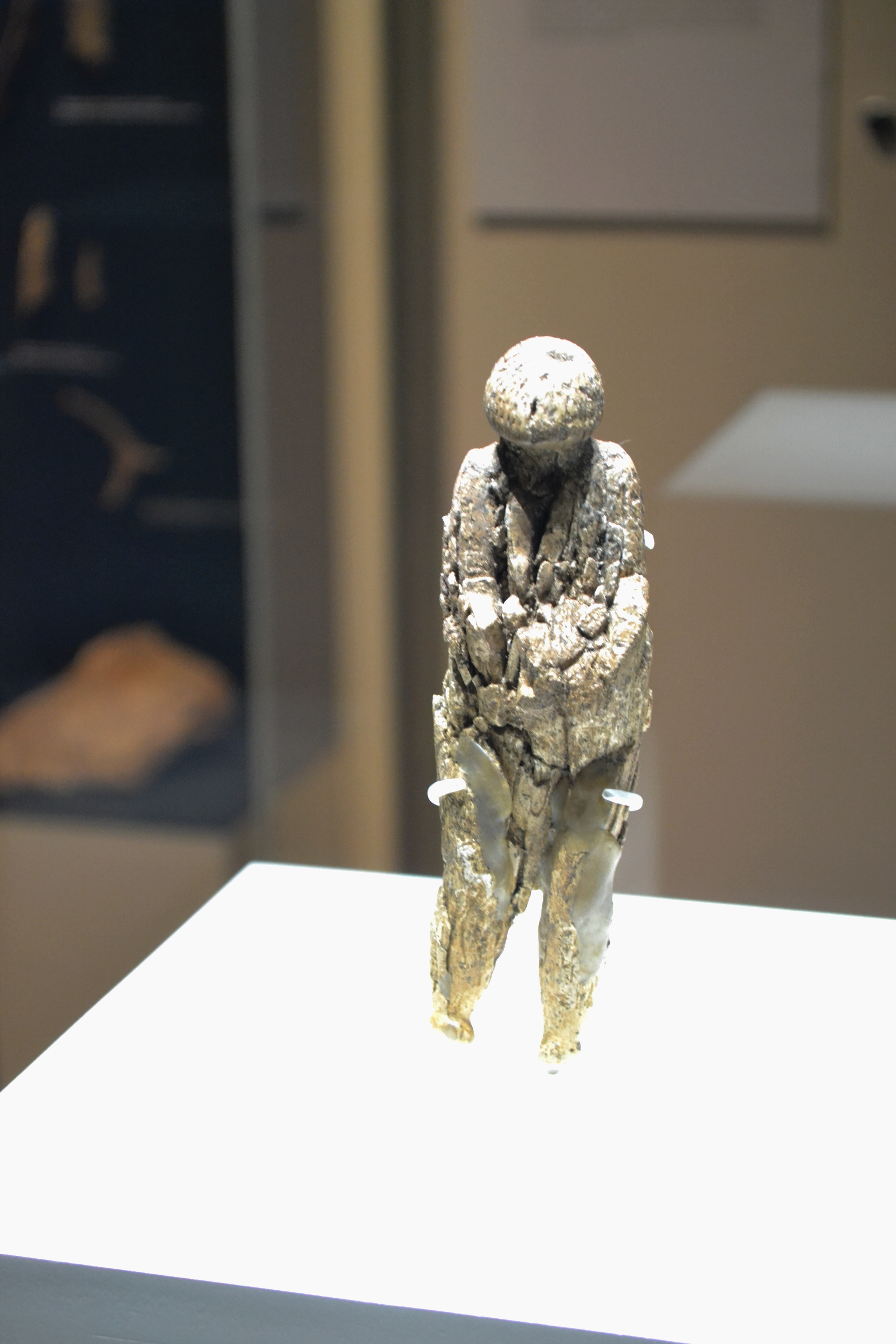 Палеолитическая статуэтка в эскпозиции музея "Зарайский Кремль". Найдена там же при археологических исследованиях Зарайской стоянки.